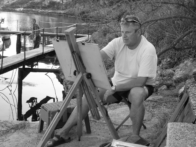 Foto